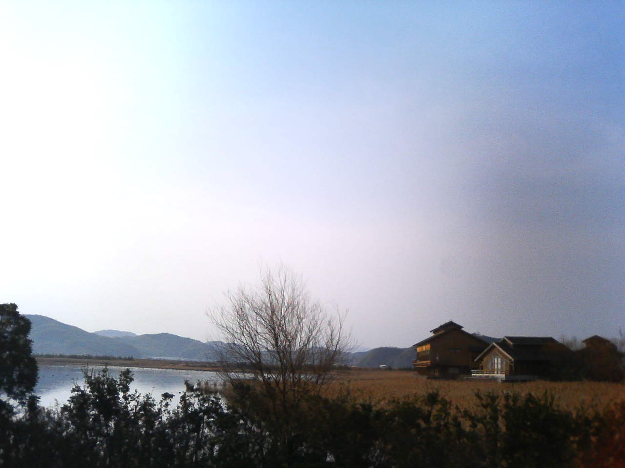 米子水鳥公園